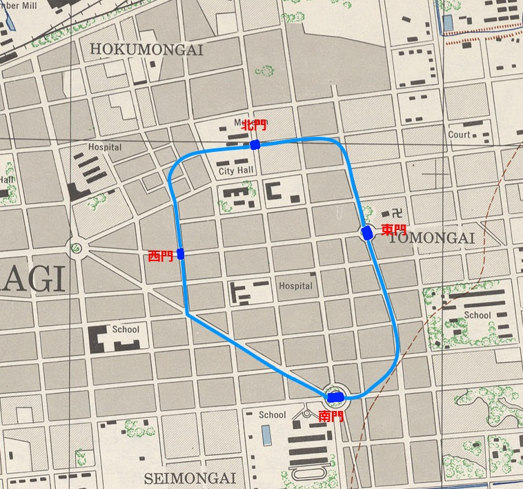 康熙年間的嘉義縣城。參考《圖繪復原下的嘉義市街生活歷史變遷》（師嘉瑀）第37頁的圖所繪